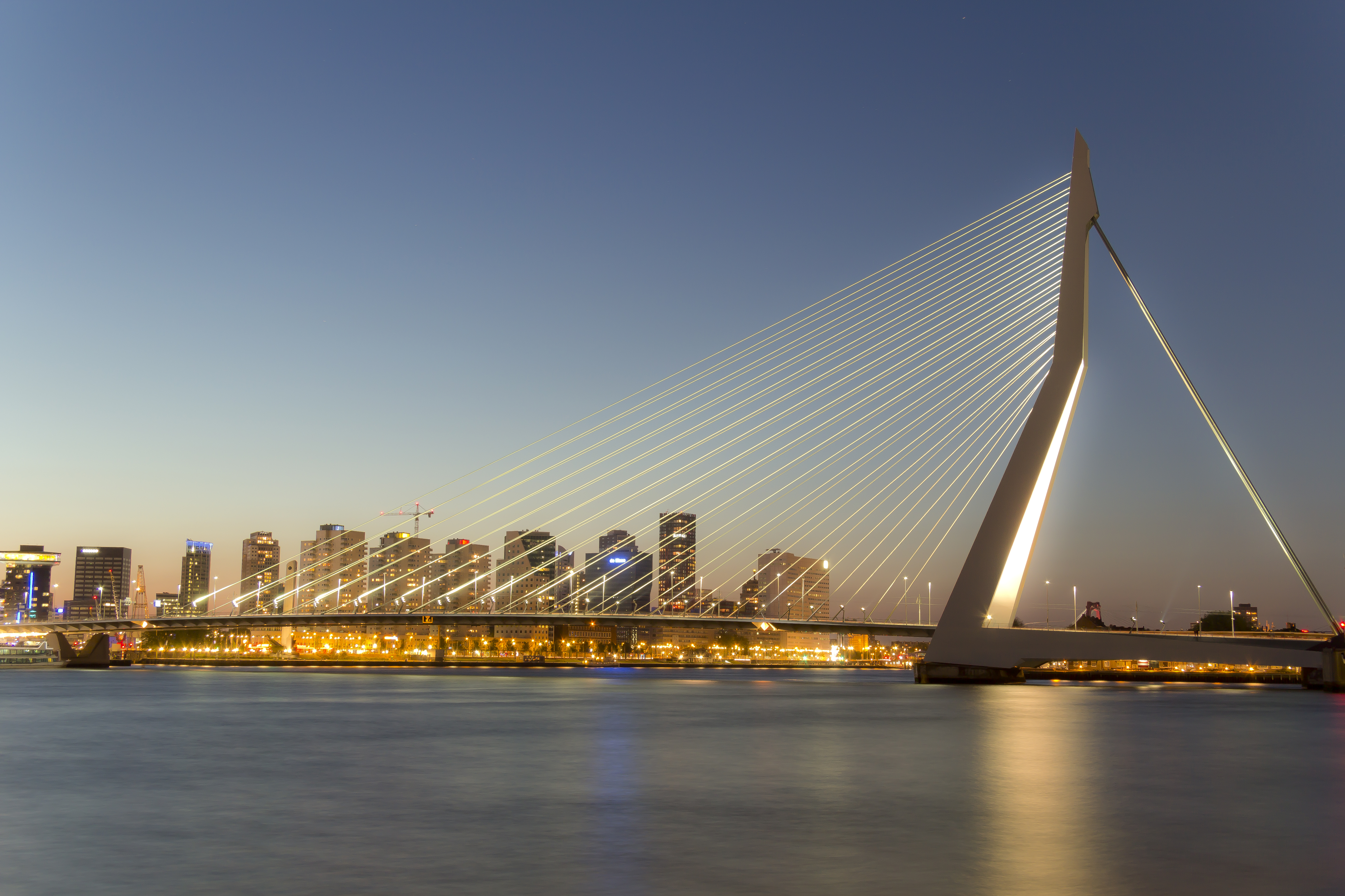 Erasmus Bridge...again!